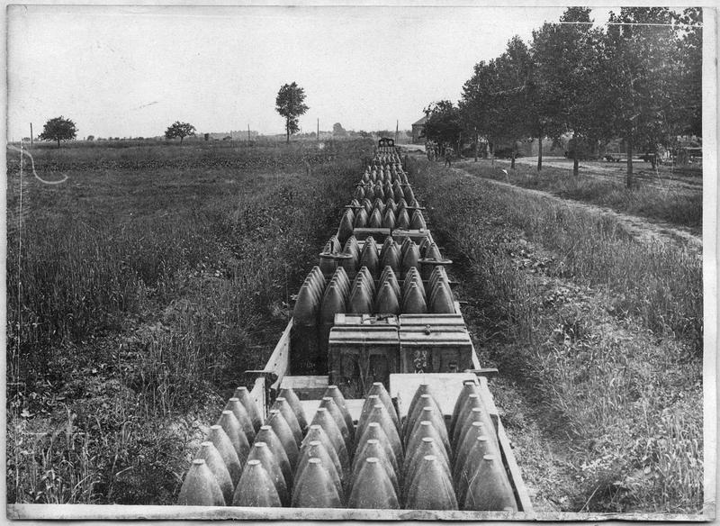 Train d'obus français de 220 mm sur voie ferrée étroite près de la gare du Quesnel (Somme).